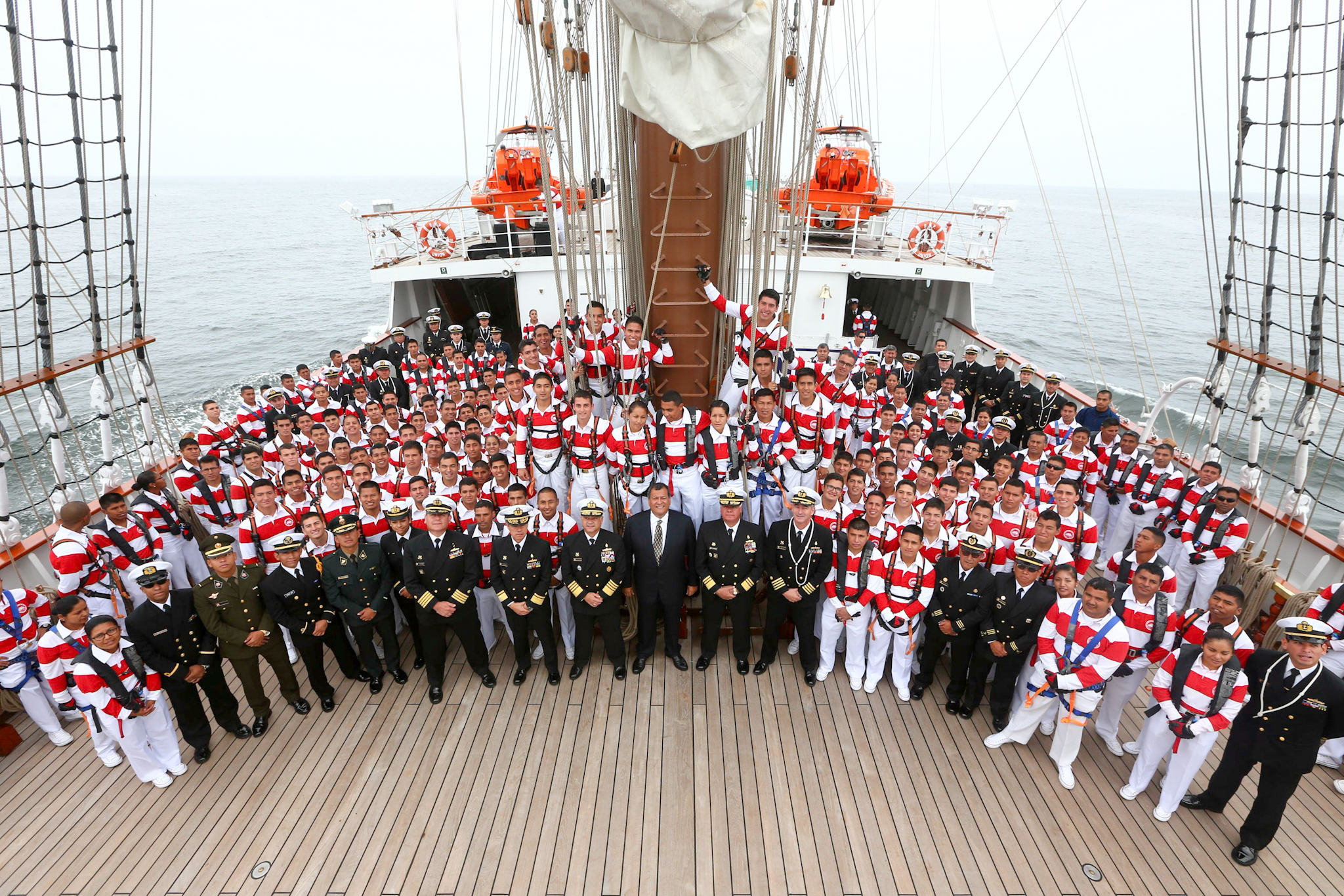 Tripulación del BAP Unión con Ministro de Defensa durante su recibimiento a su arribo del VIEX 2017 (Puerto del Callao)